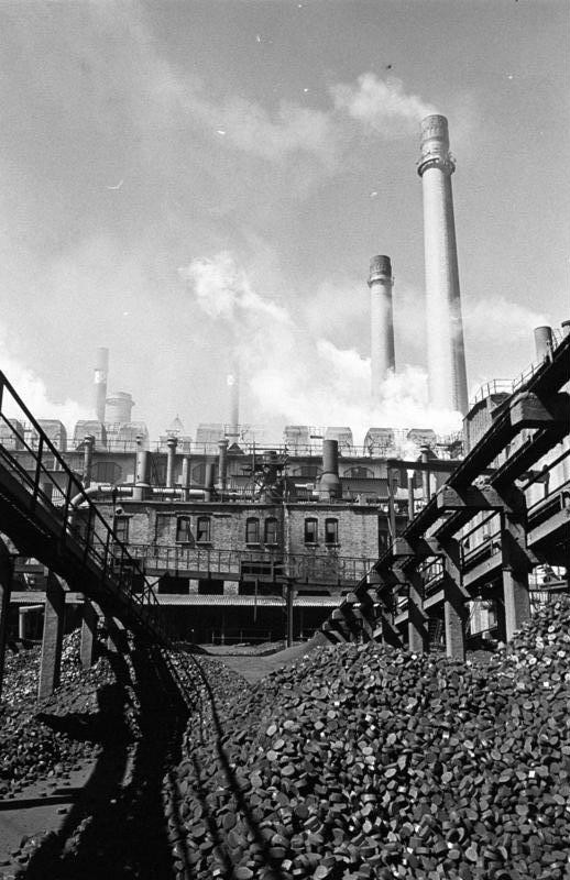 Lauchhammer, stillglegte Brikettfabrik ADN-Weisflog/9.5.90 Bez. Cottbus: Brikettfabrik im "Ruhestand"; in den vorläufigen "Ruhestand" versetzt wurde eine Brikettfabrik des VEB Braunkohlenveredelung Lauchhammer im Ortsteil West. Erstmals im Industriezweig wird damit eine Brikettfabrik für mehrere Jahre nahezu komplett "konserviert". Es verbleiben Möglichkeiten für eine spätere Rekonstruktion und Modernisierung. Kein einziger der 50 Beschäftigten der Fabrik wird durch die Stillegung arbeitslos. Information added by Wikimedia users.Lauchhammer, stillgelegte Brikettfabrik